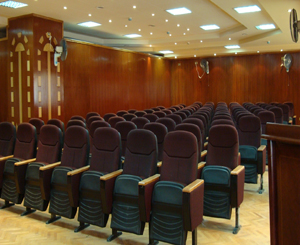 قاعة المؤتمرات بكلية الحقوق جامعة الزقازيق بالمبني الرئيسي للكلية بالحرم الجامعي